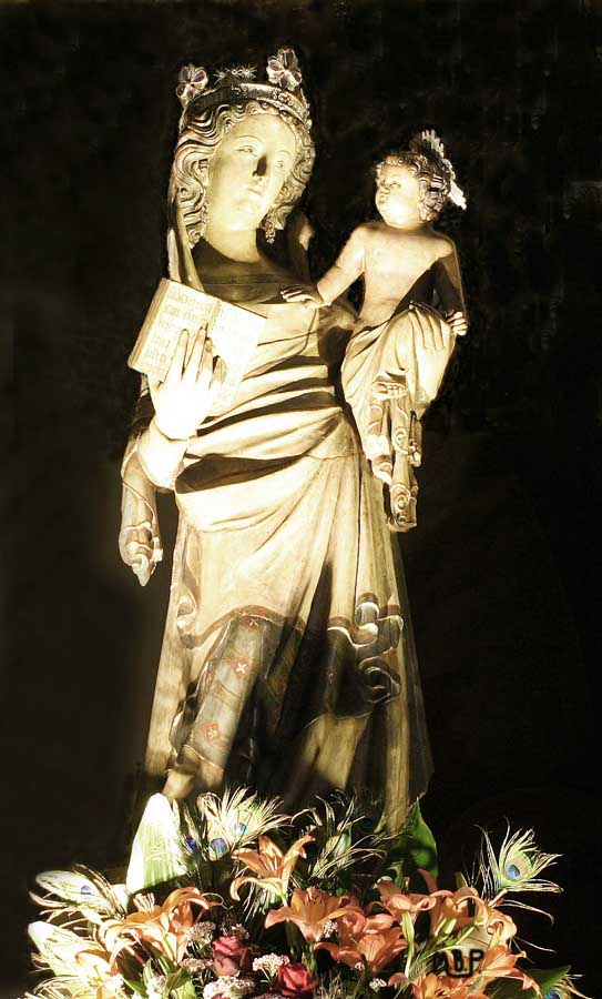 Virgen del Patrocinio de Cardona; Imagen del GoticoAlabastro policromada, gotica S.XIV. Parroquia de Sant Miguel de Cardonaatribuida a maestros del taller de Rieux. que causo un notable impacto en todo la escultura del gotico Catalan.